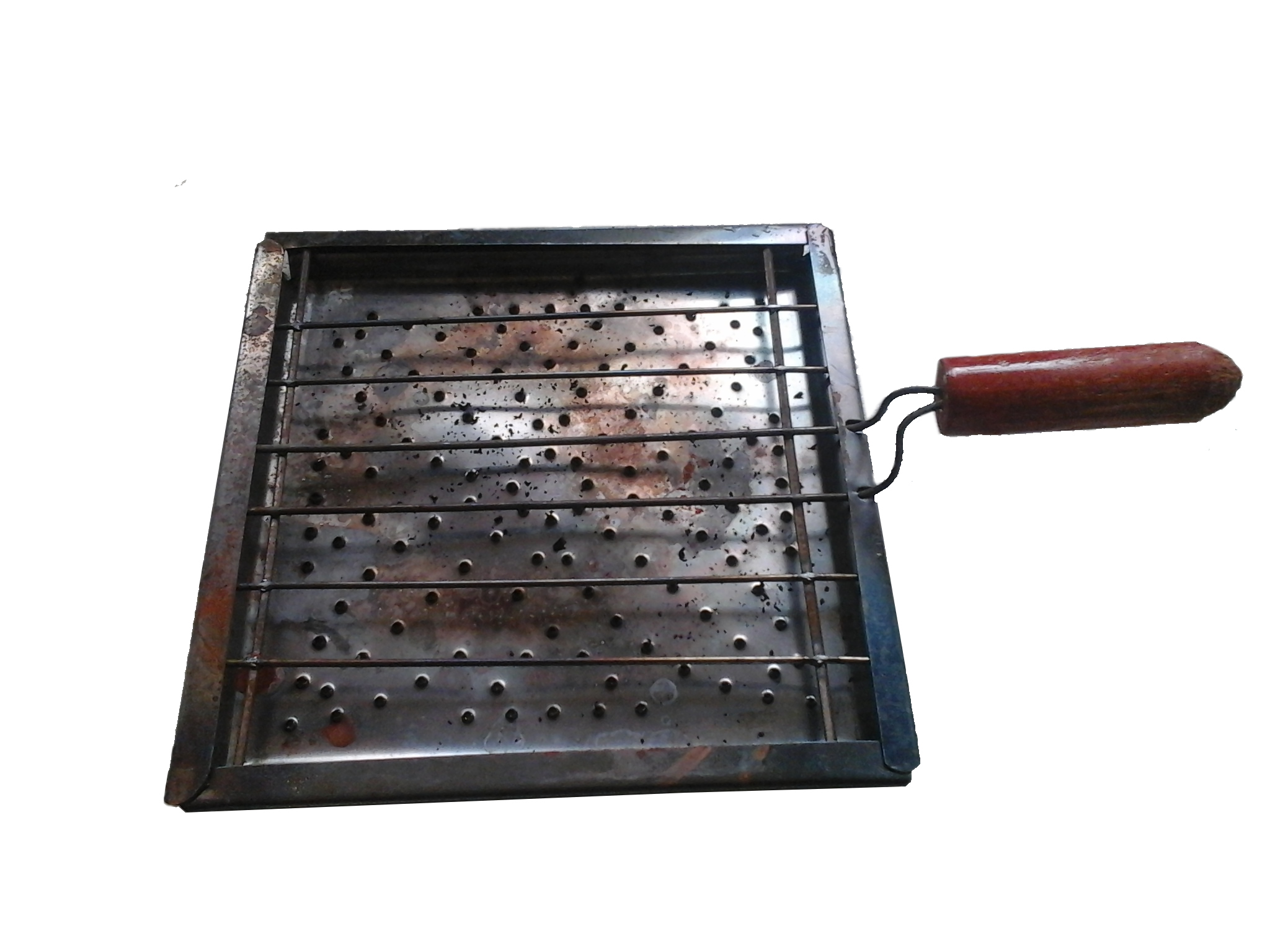 Tostador para pan y cocinar arrpz usado en Chile